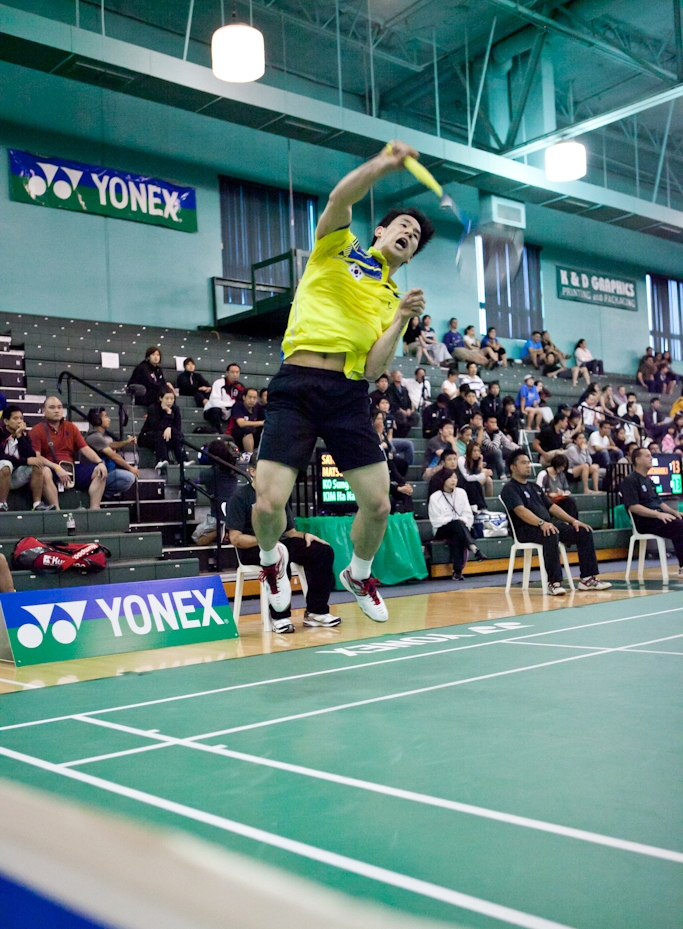 Ko Sung-hyun